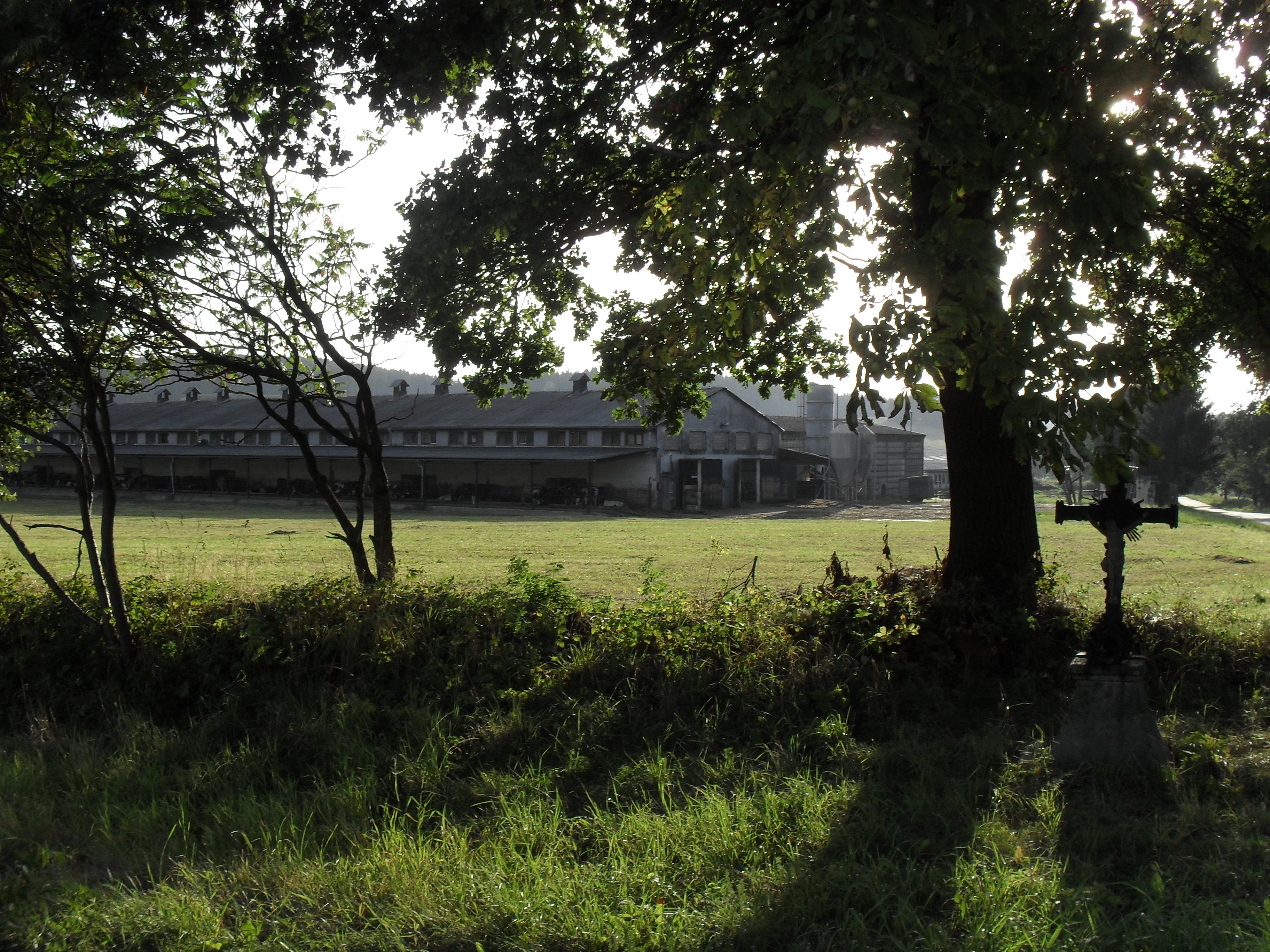 Bývalé Řesanické JZD, dnes stále v provozu jako kravín.